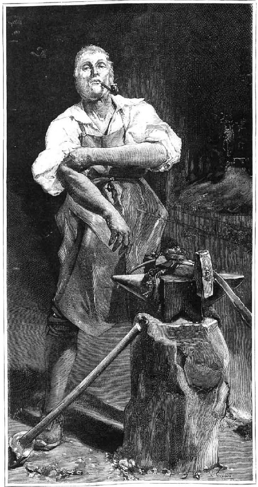 Herrero, obra del pintor Ricardo Villegas Cordero, presentada en la Exposición General de Bellas Artes de 1887, recogida en la revista española La Ilustración Española y Americana